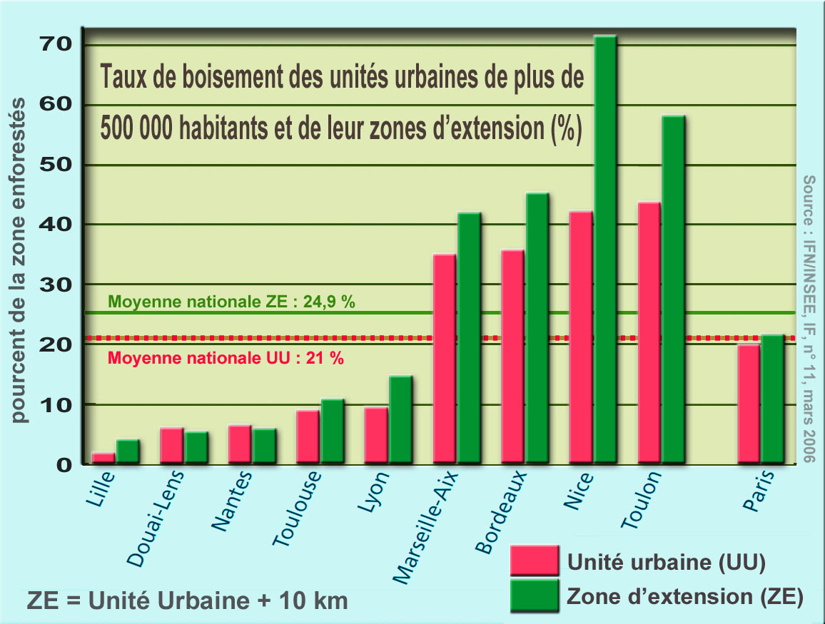 Pour quelques grandes unités urbaines de France, pourcentage de boisement des unités urbaines de plus de 500 000 habitants, et de leur zones d’extension (même zone + ceinture de 10 km, distance choisie par ce qu'en 2005, les français des unités urbaines se disaient prêts à faire 10,5 km en moyenne pour aller se promener en forêt